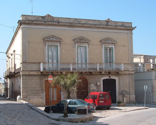 Ingresso del Museo Civico